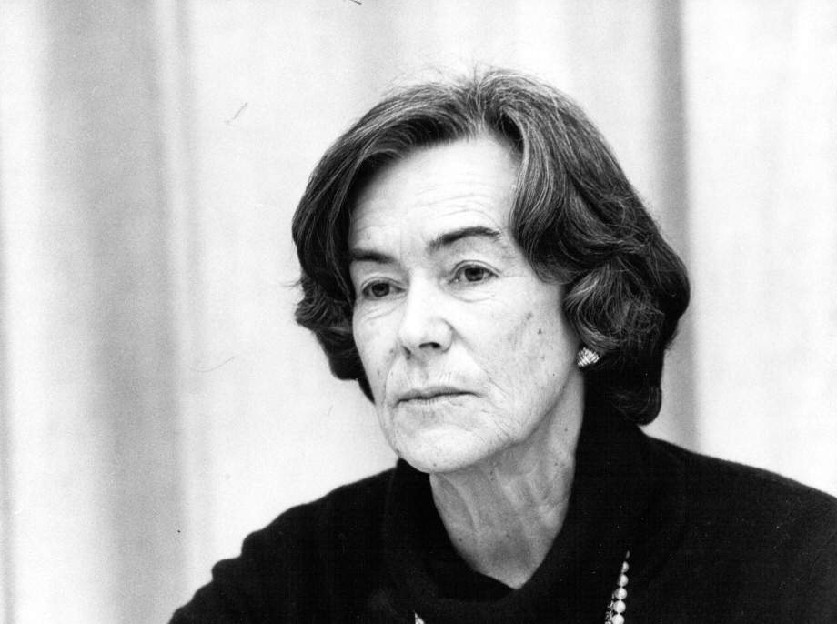 Monique Bauer-Lagier, Genfer National- und Ständerätin